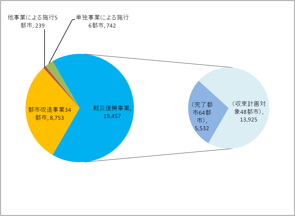 戦災復興都市計画区域面積（収束計画）